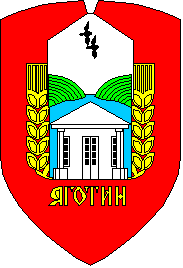 Герб Яготина 1989 року